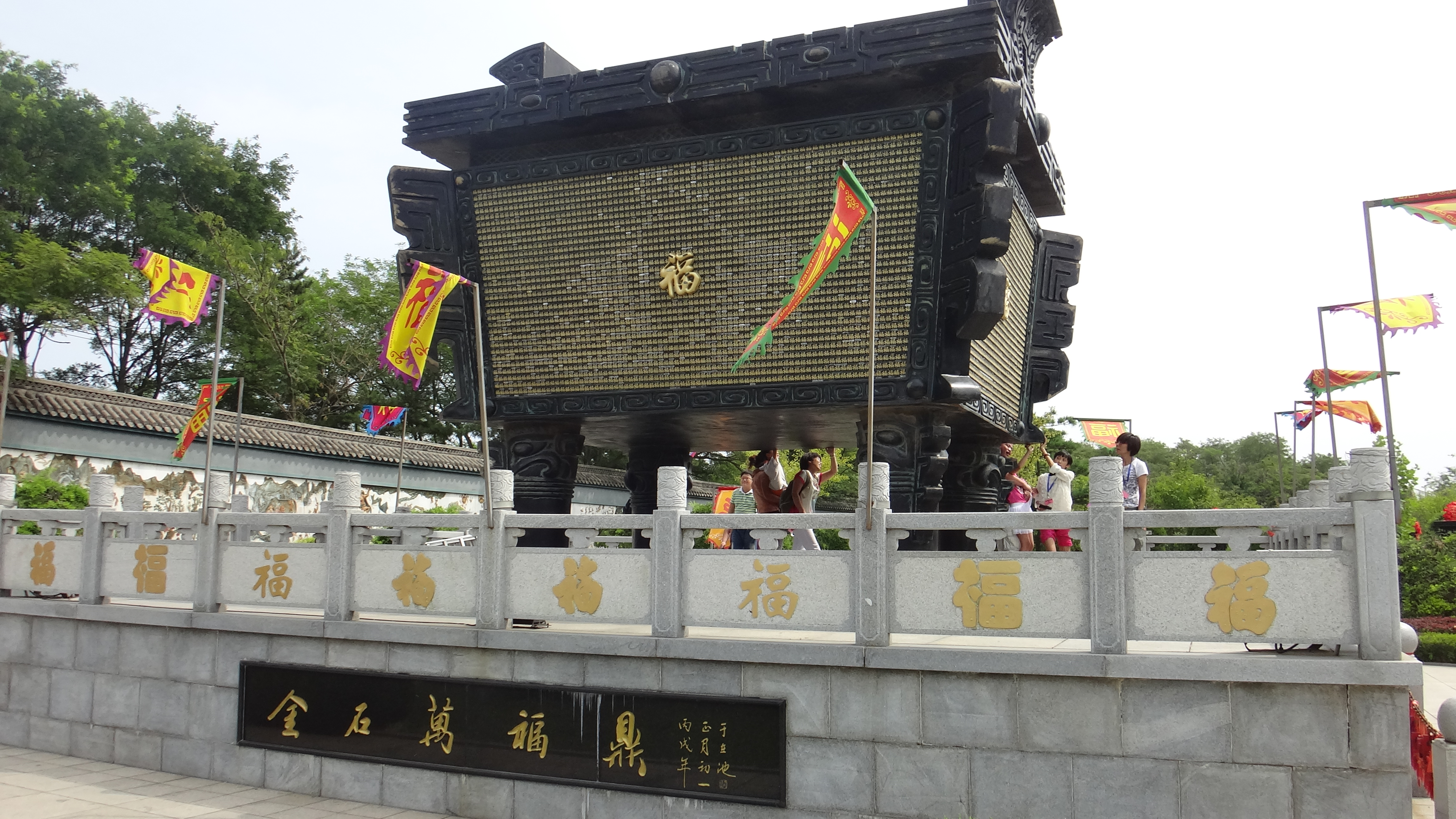 大连金石滩地区的万福鼎。该鼎上有一万个“福”字。